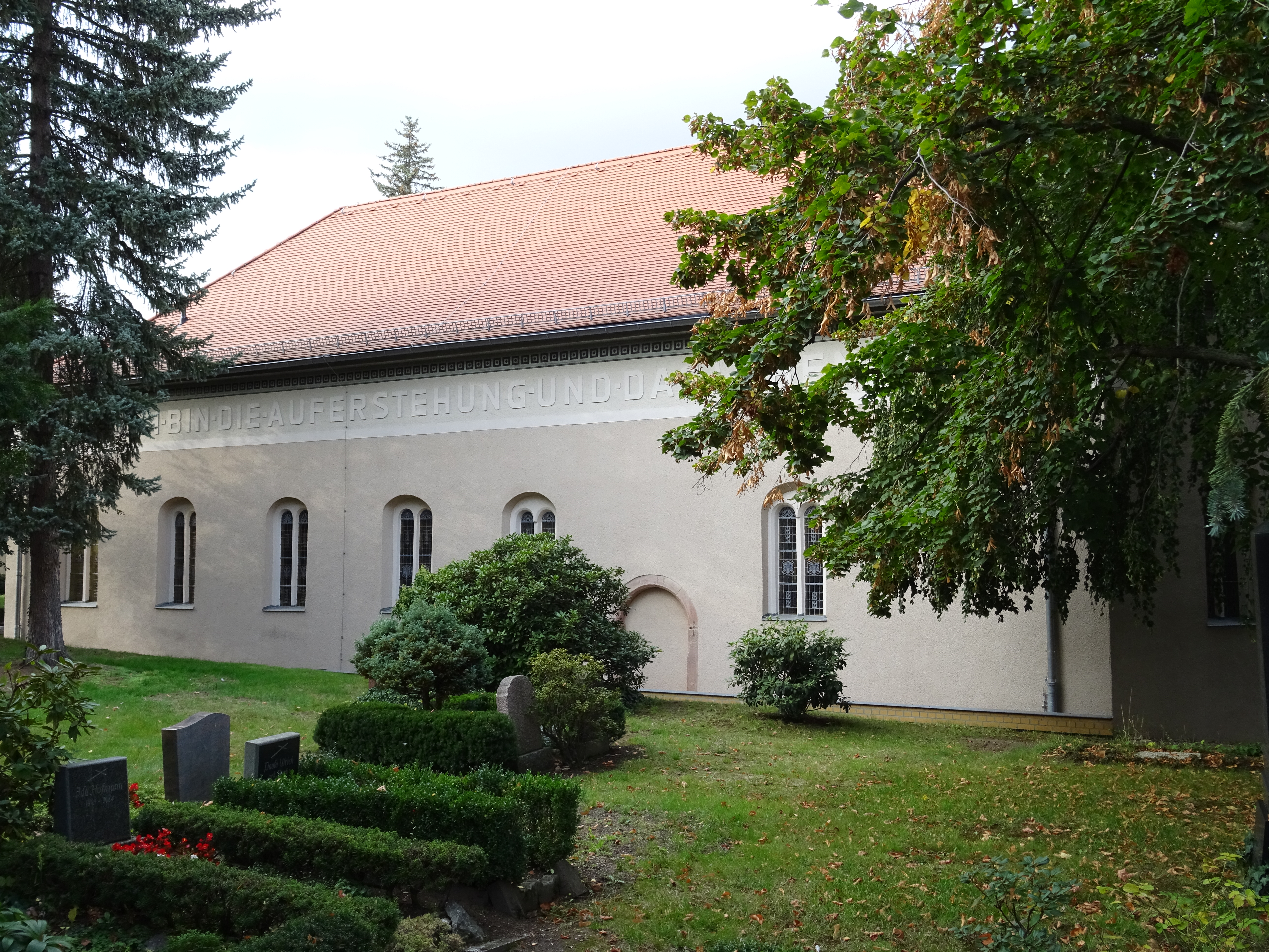 Friedhofskirche Heilig Kreuz in Grimma. Von 1556 bis 1559 erbaut. 1607 umgebaut und 1910 erneut umgebaut und erhöht. Mit historischen spätgotischen Flügelaltar (entstanden um 1519) stammt aus der 1888 abgerissenen Grimmaer Nicolaikirche. Er enthält reich ausgestattete Schnitzwerke und Bilder aus der Cranachschen Schule.